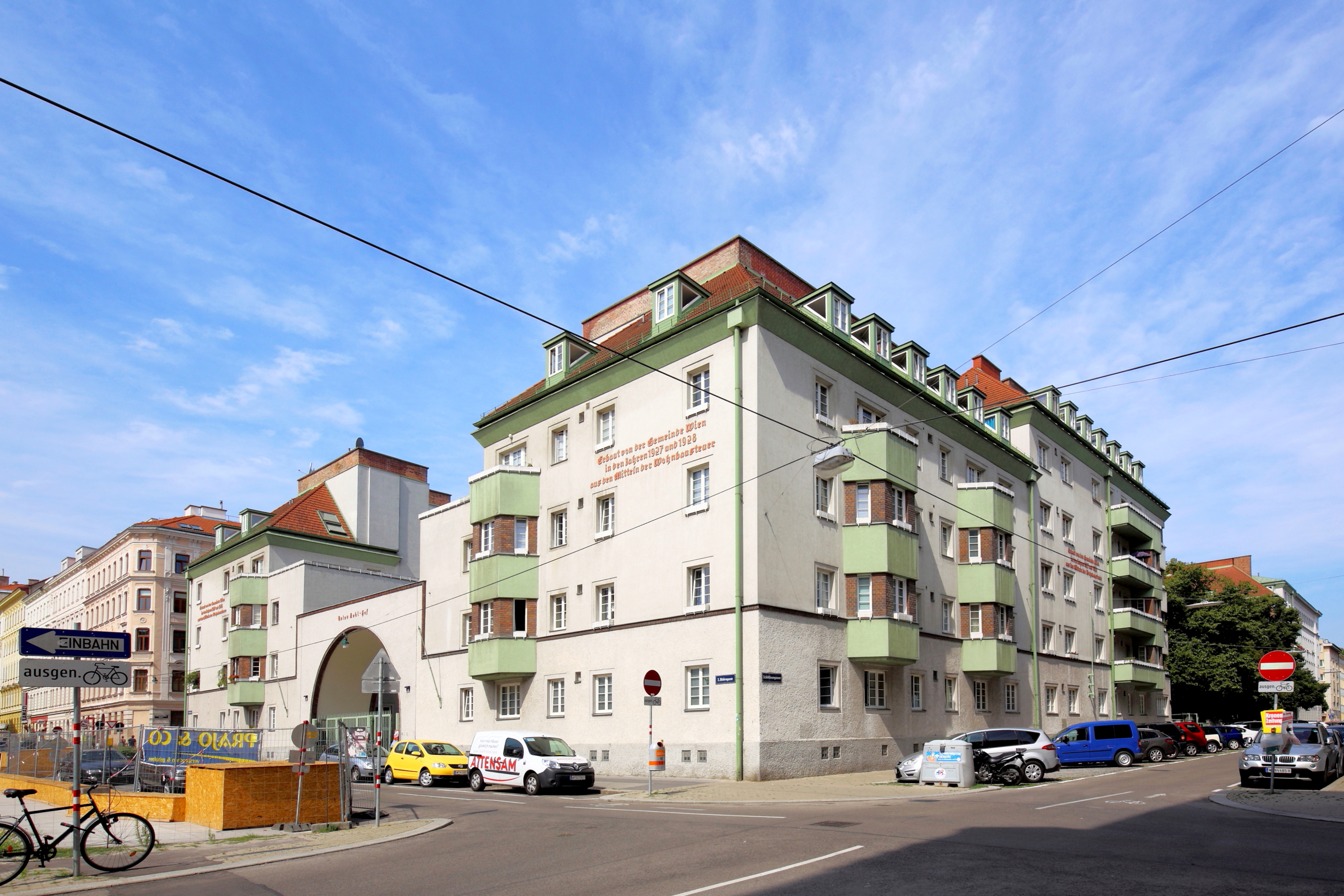 Der "Anton-Kohl-Hof", ein Gemeindebau mit rund 180 Wohneinheiten im 3. Wiener Gemeindebezirk Landstraße. In den Jahren 1927/1928 nach Plänen von Camillo Fritz Discher und Paul Gütl errichtet und 1949 nach dem sozialdemokratischen Wiener Politiker Anton Kohl (1867–1934) benannt.